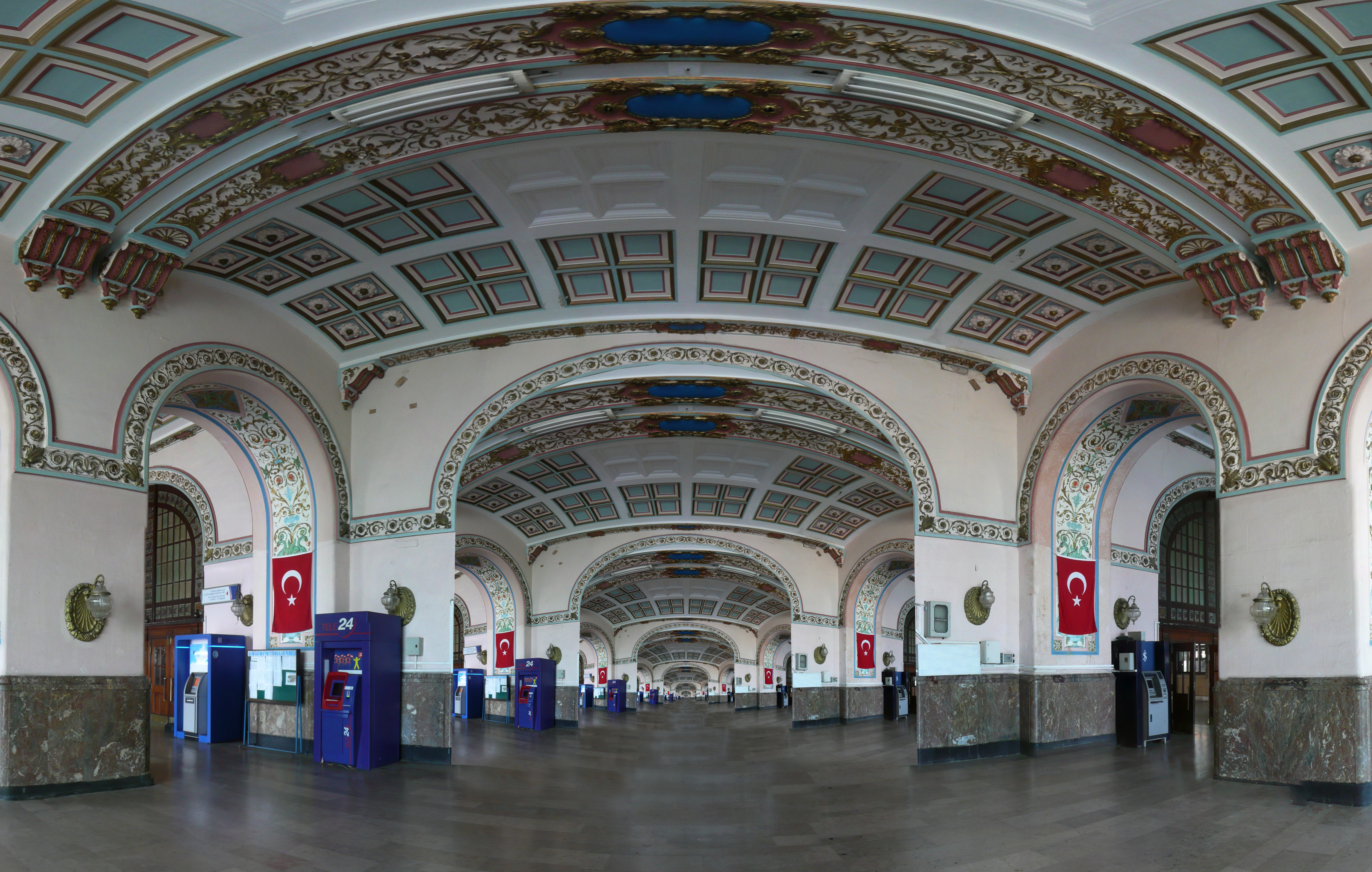 Haydarpaşa terminalı, Droste effect